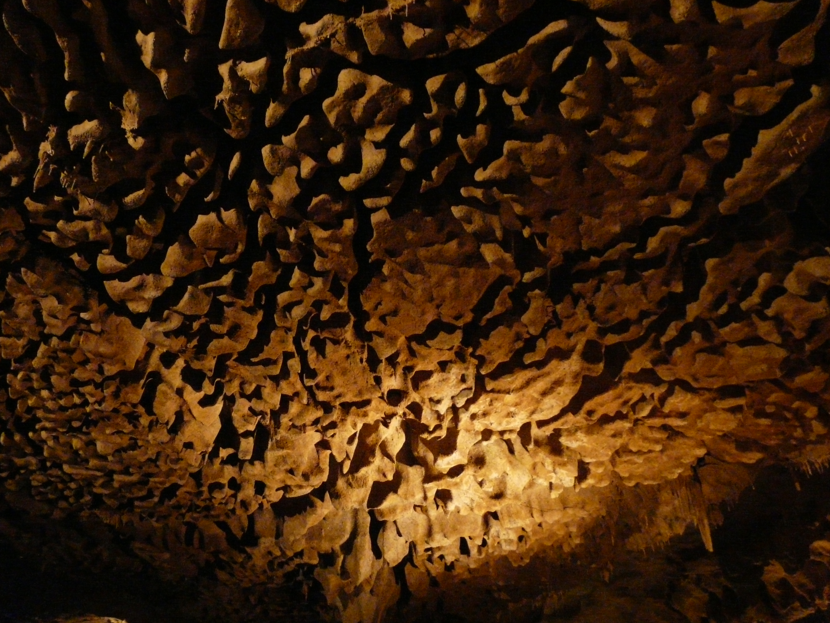 Le plafond à l'intérieur des grottes de Bétharram.